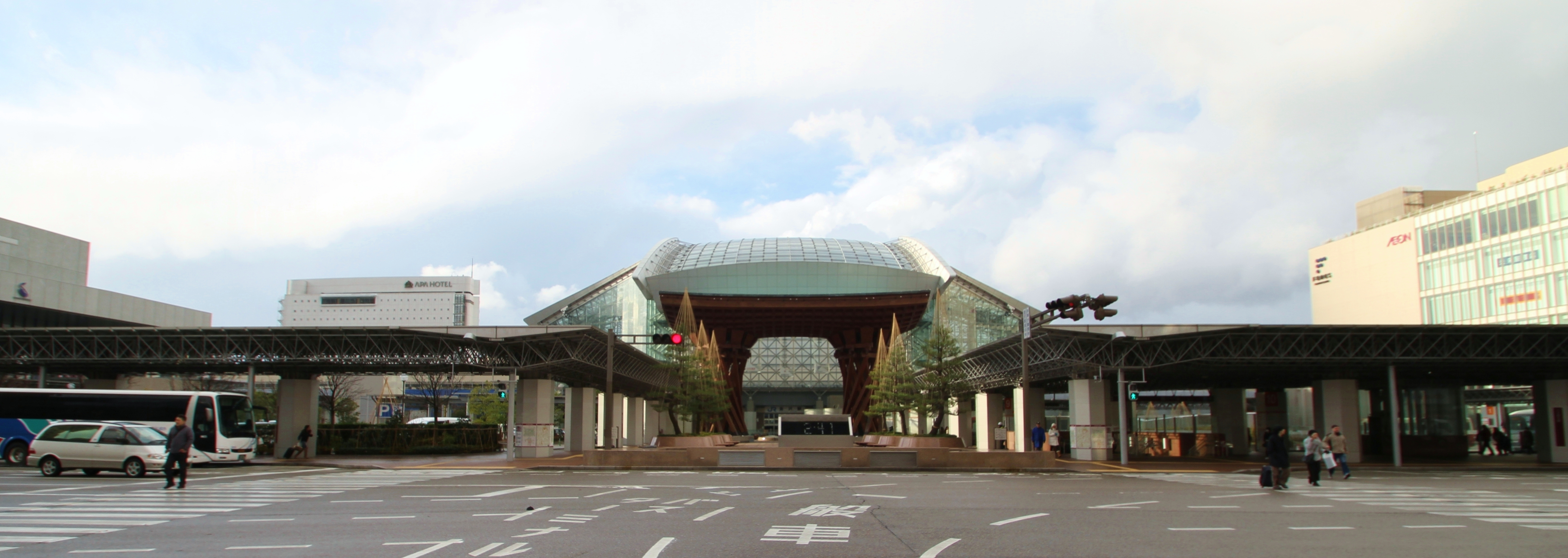 Kanazawa Station